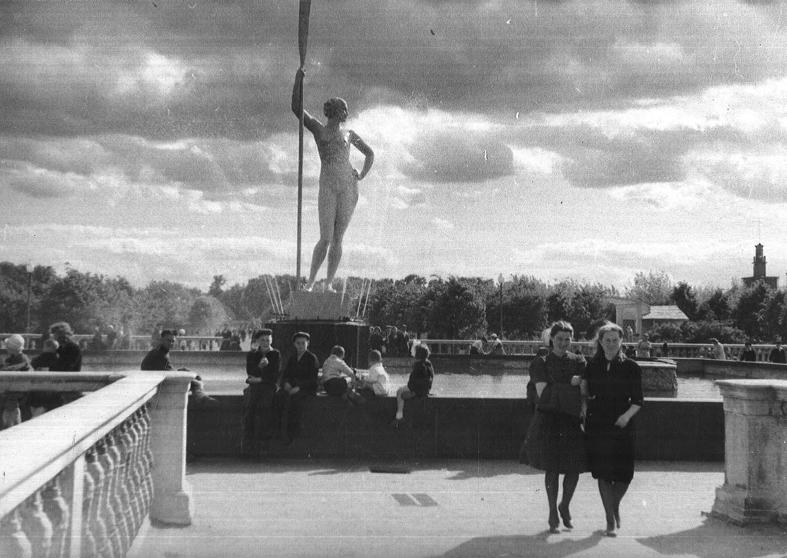 Скульптура "Девушка с веслом" раньше стояла в Парке Горького